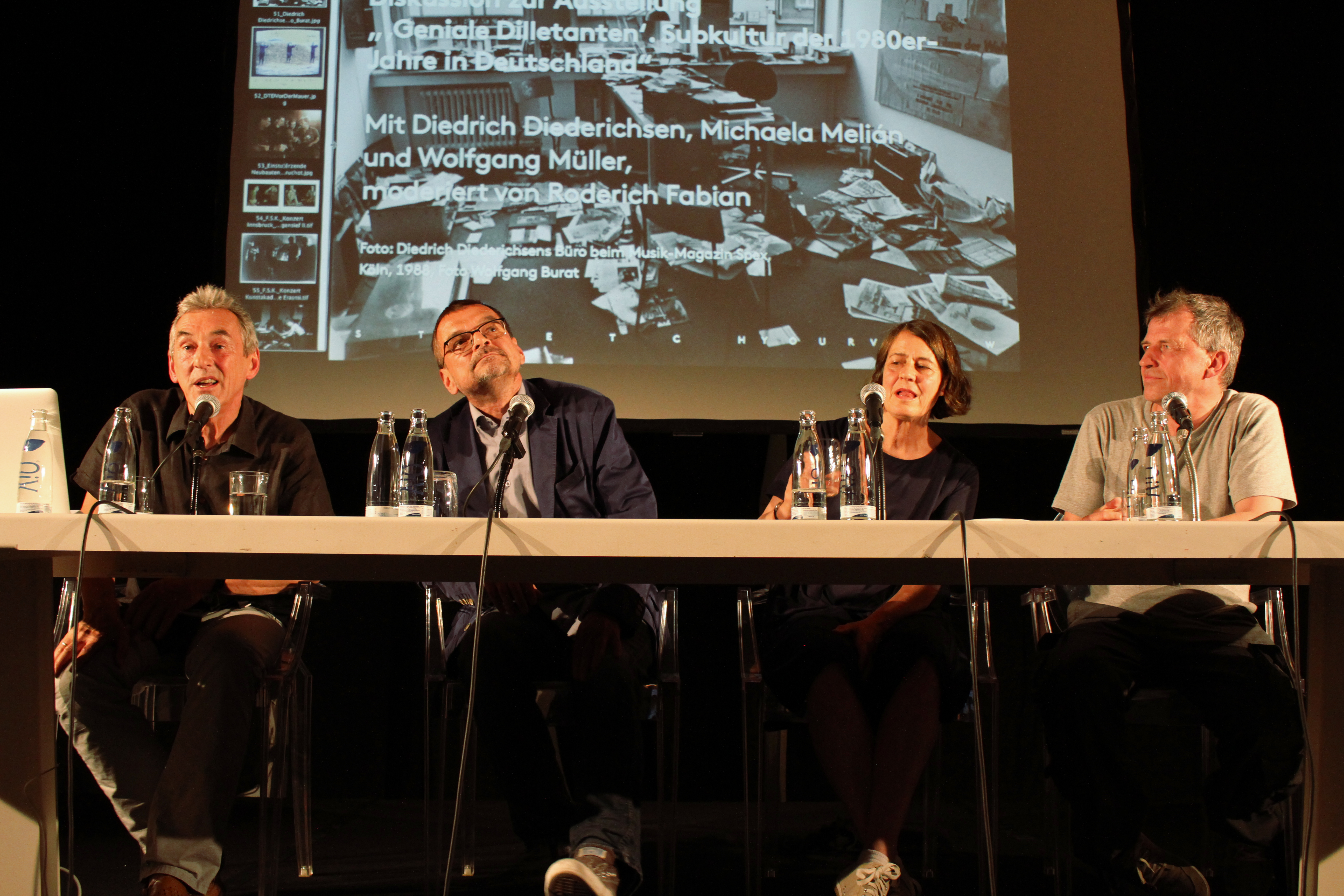 ""Geniale Dilletanten (sic!). Diskussionsveranstaltung im Haus der Kunst, München